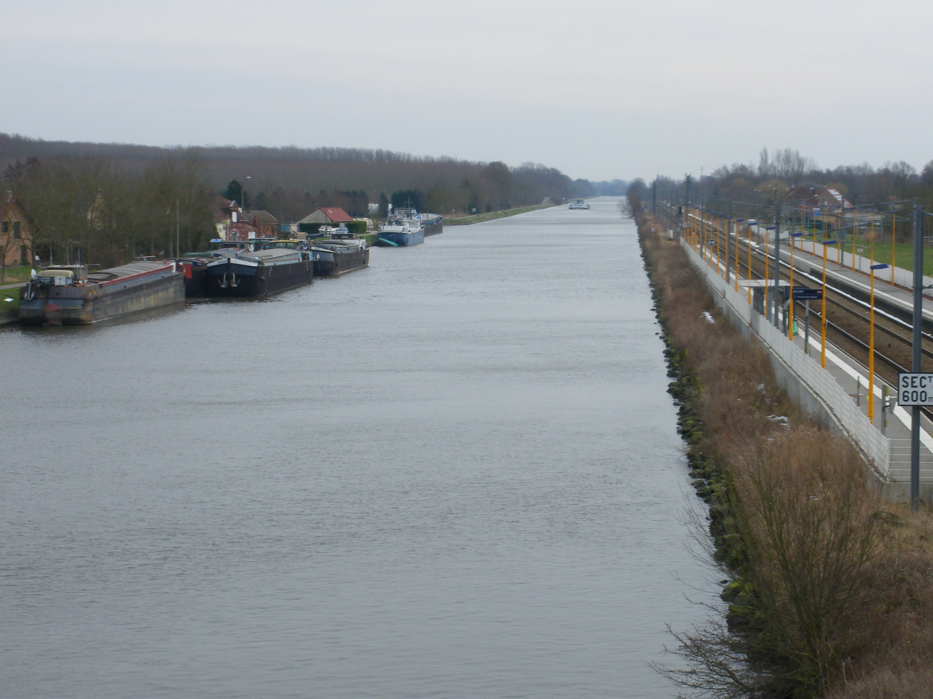 Vue du canal d'Aire ainsi que de plusieurs péniches et de la ligne de Fives à Abbeville au niveau de la gare de Beuvry.